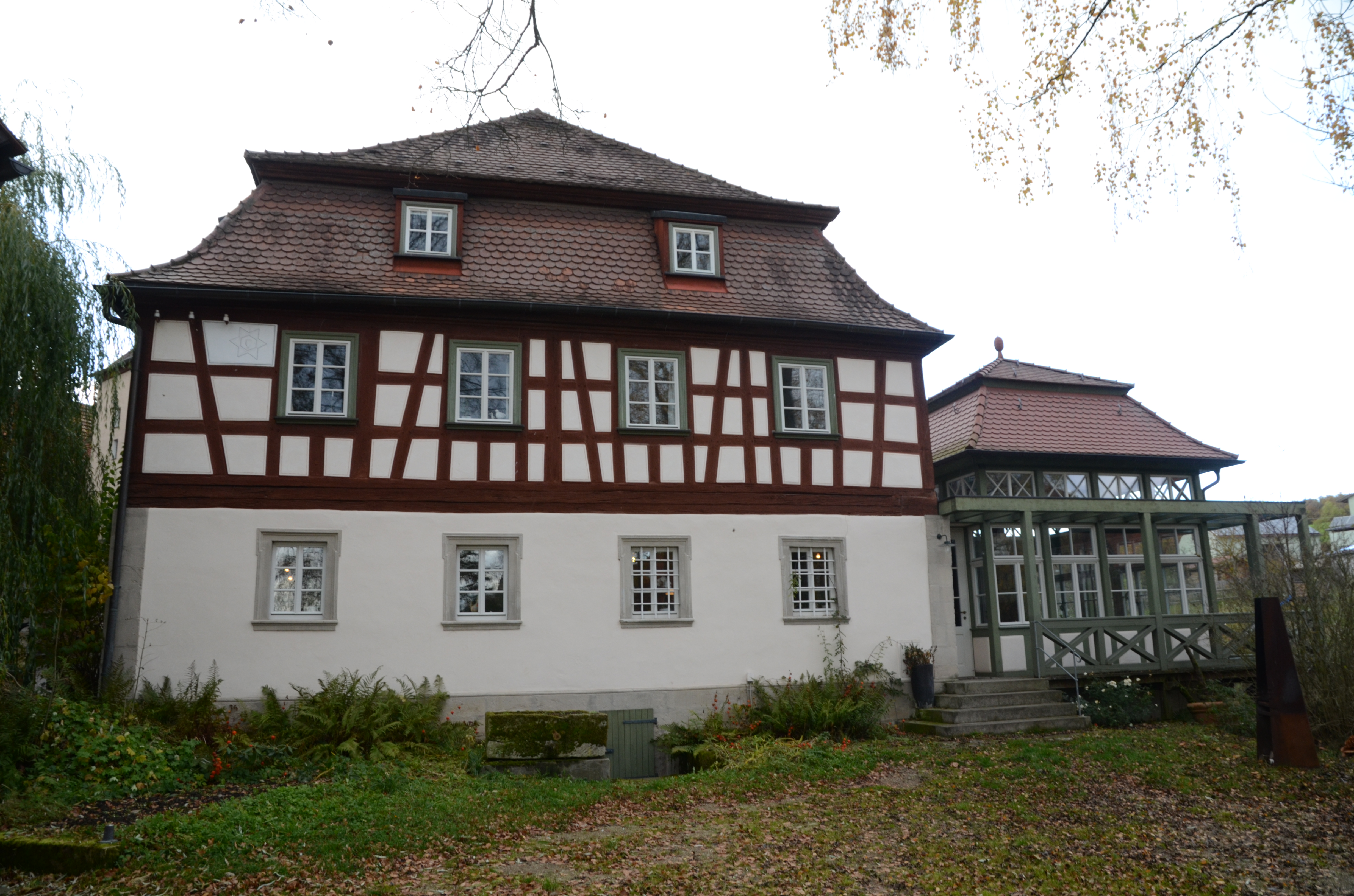 Pettstadt, Nr. 3